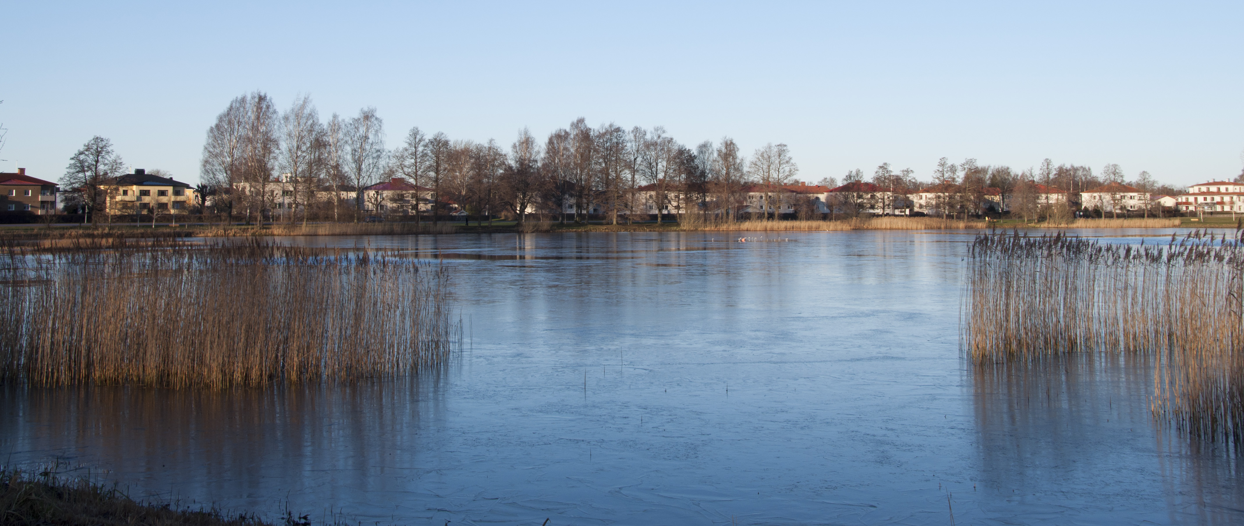 Sundstatjärn i Karlstad